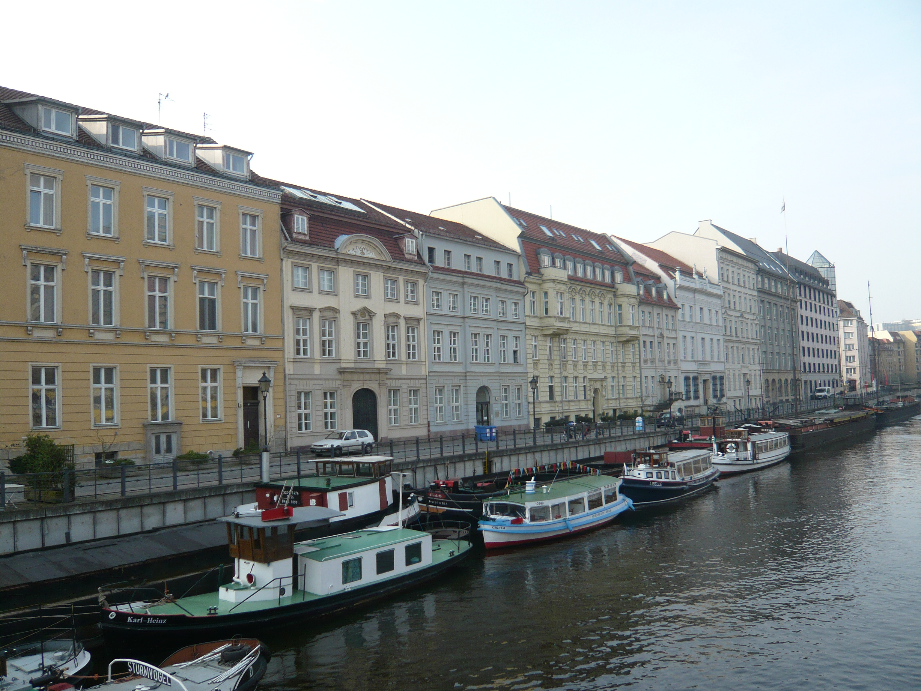 Berlin-Mitte; Märkisches Ufer